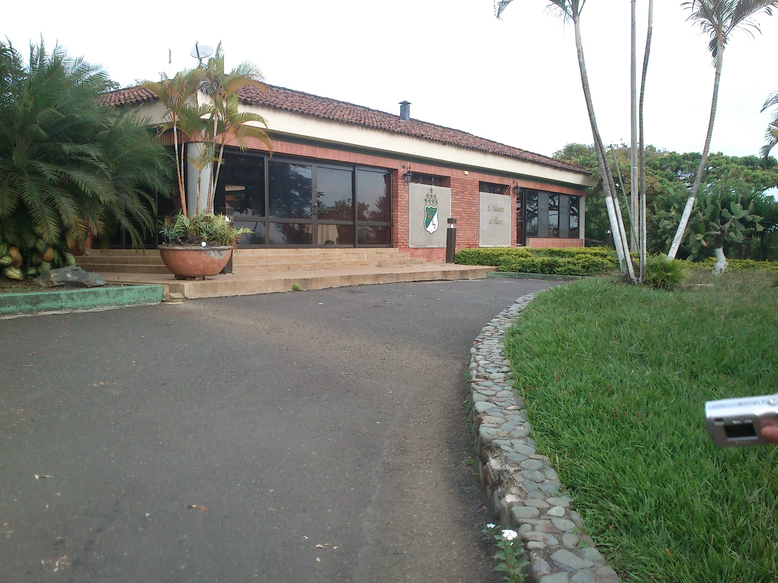 Kampara sidejo de la ĉiama gloria futbalteamo Deportivo Cali. En la foto videblas la hotelon.